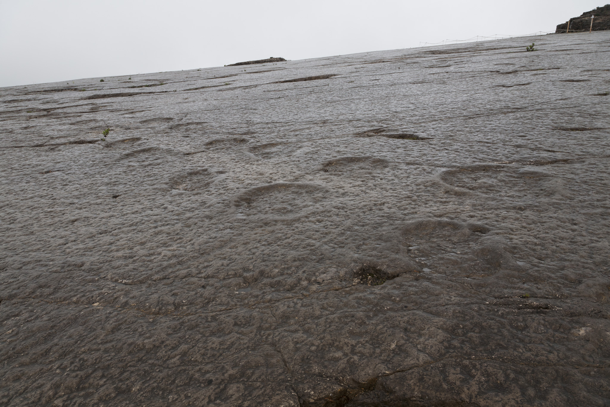 Pegadas de Dinossáurios da Serra de Aire